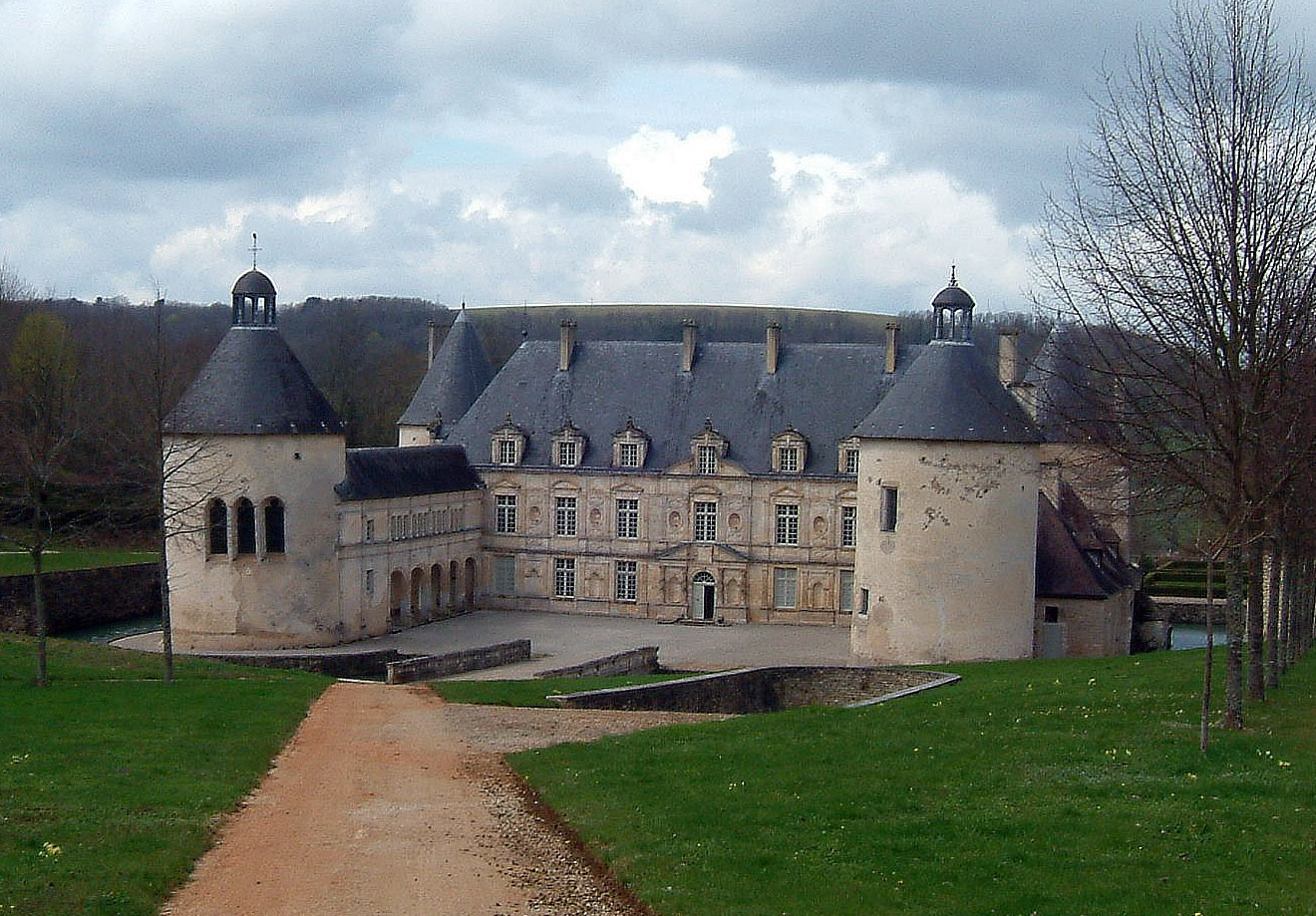 Schloss Bussy-Rabutin in Bussy-Rabutin, Côte-d’Or, Burgund